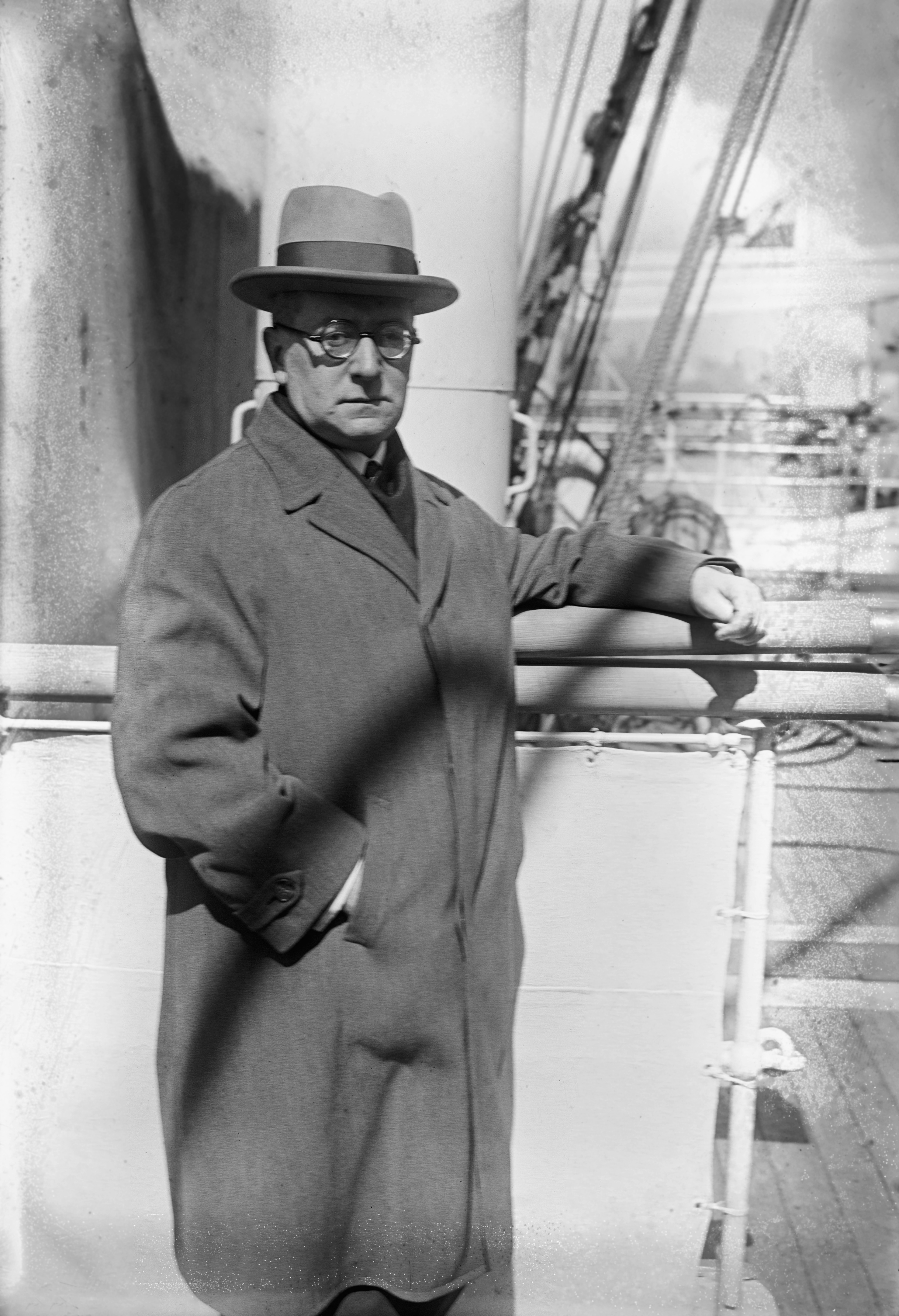 Carl Flesch (1873 - 1944), Hungarian violinist